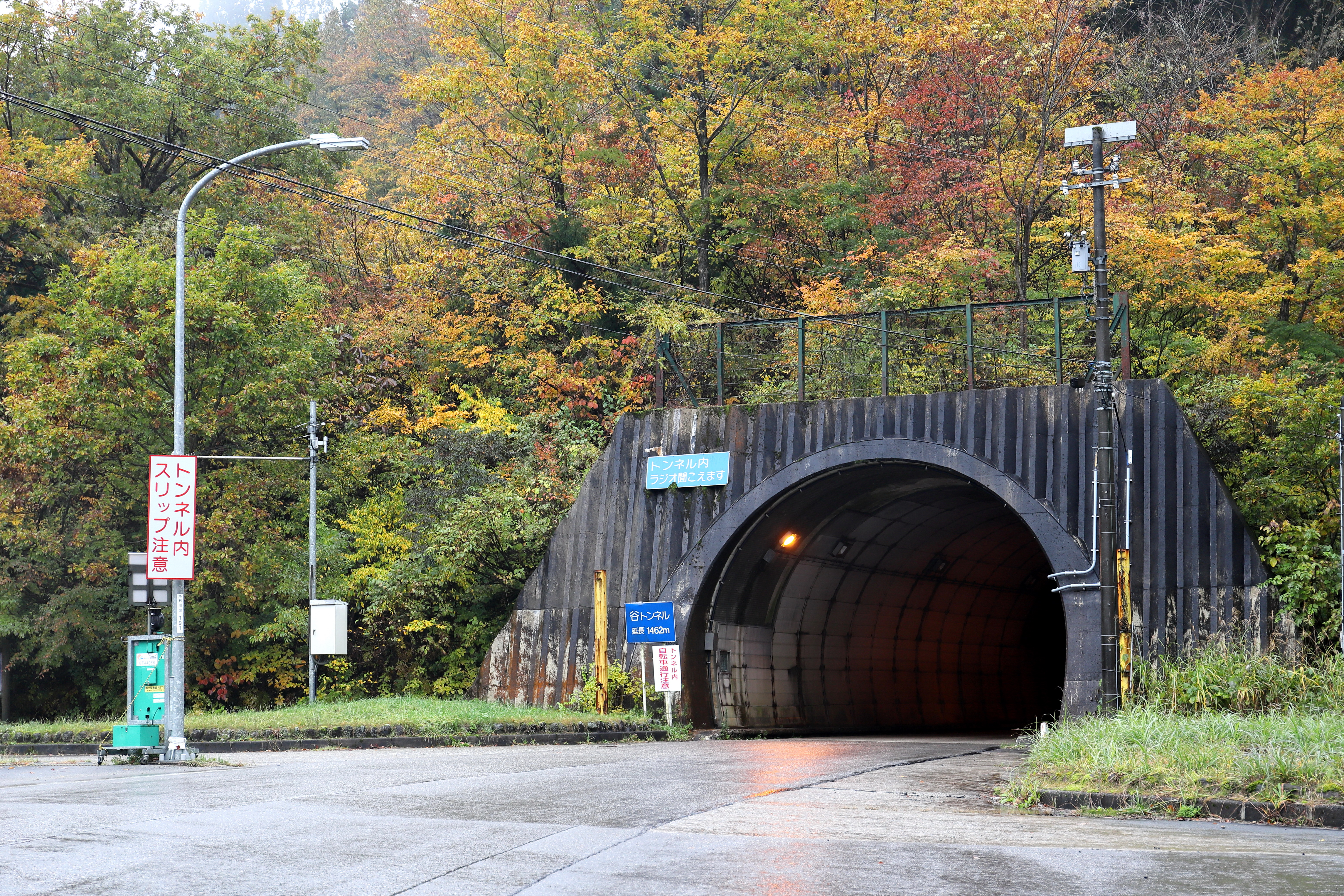 谷トンネル（石川県側）